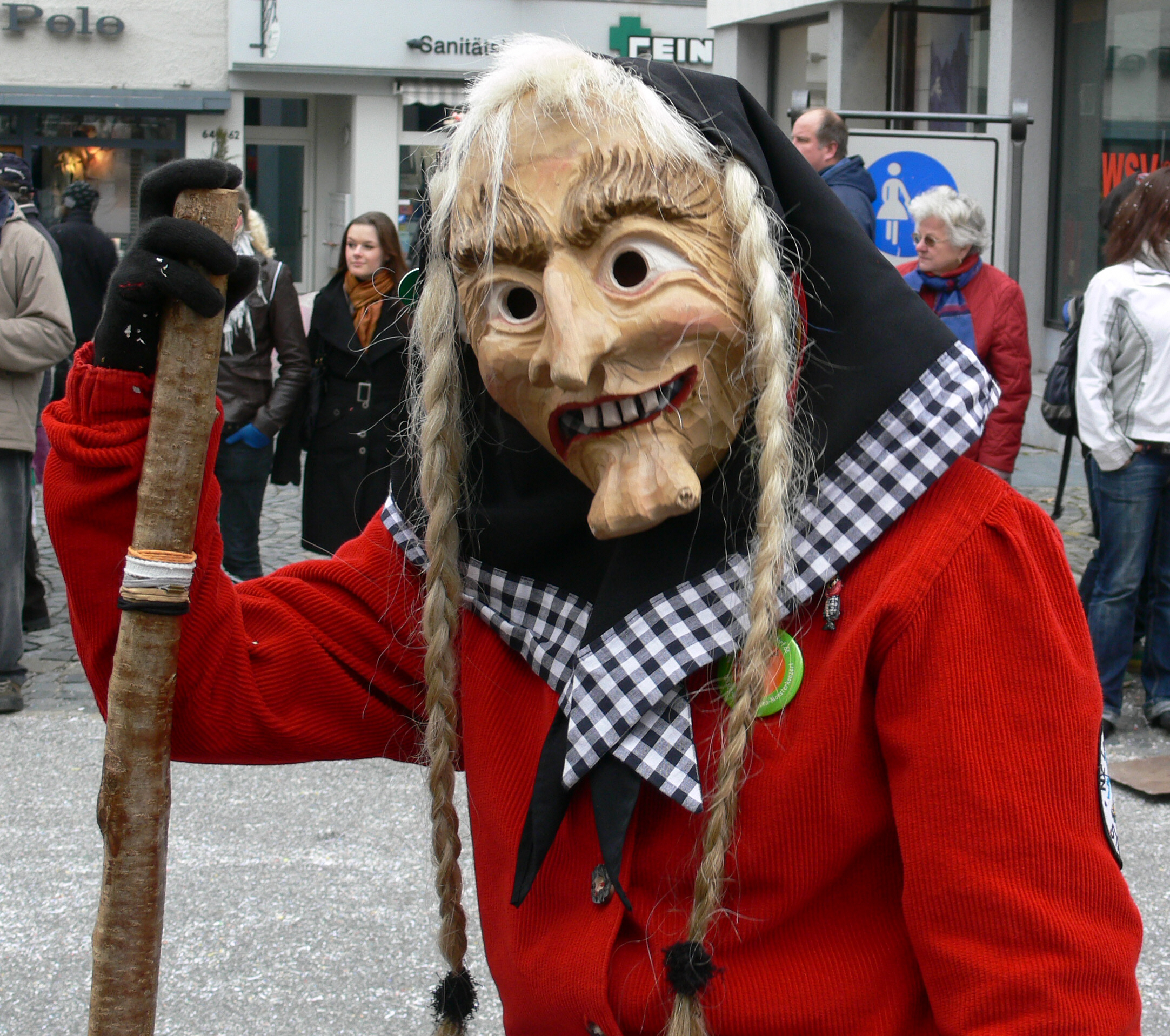 Narrensprung am Fasnetsmontag, 4. Februar 2008 in Ravensburg: Stallhex der Narrenzunft „Lachende Kuh“ Isny